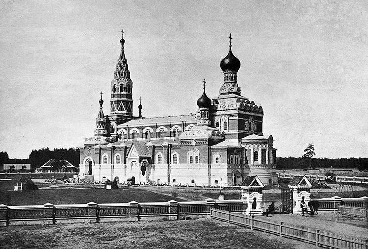 Георгиевский собор в Гусь-Хрустальном